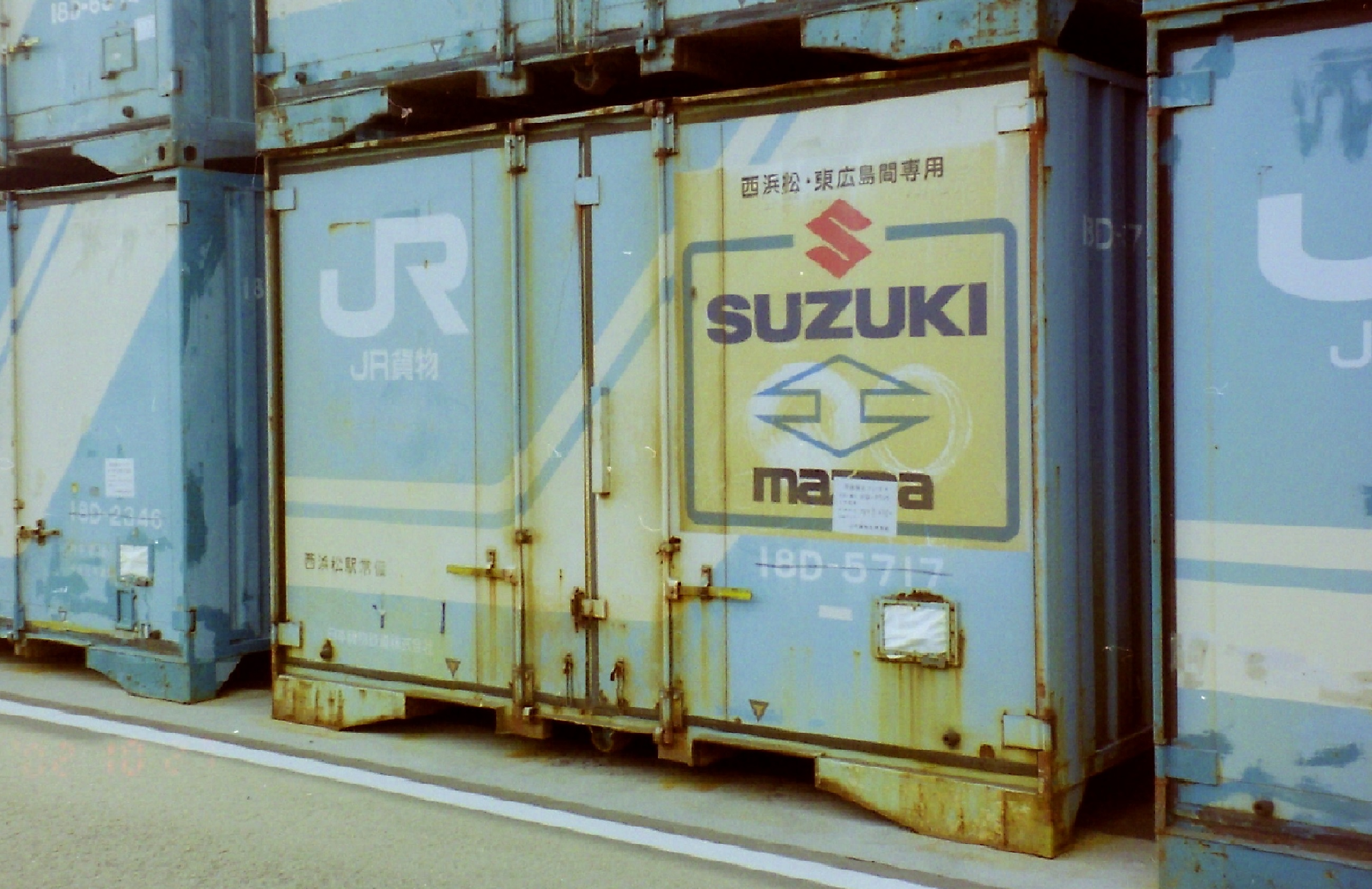 撮影地＝【福岡／北九州(タ)】